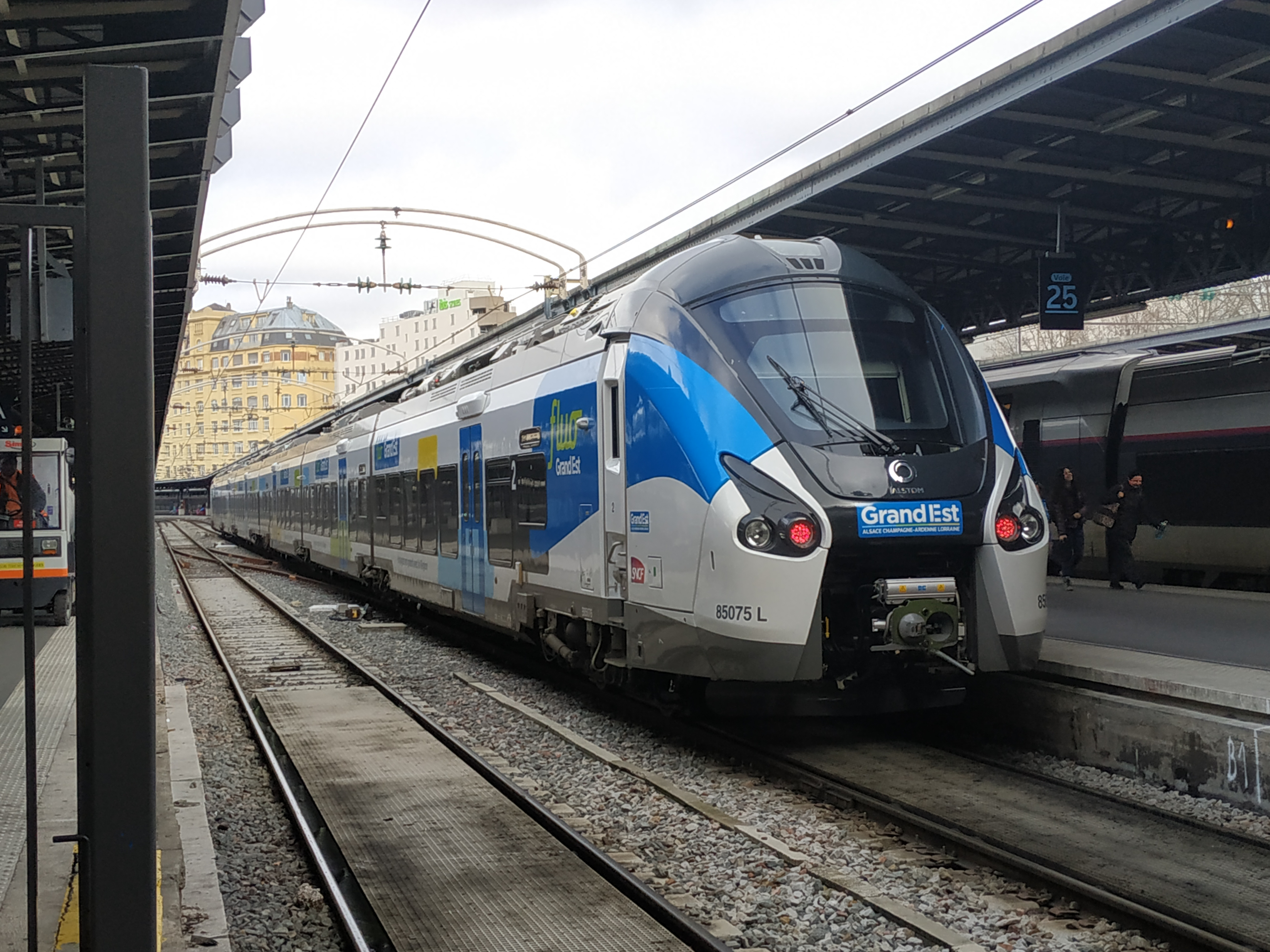 Alstom Regiolis - Coradia Liner Intercités B85075 du TER Grand Est en livrée Fluo Grand Est, vu ici à Paris Est